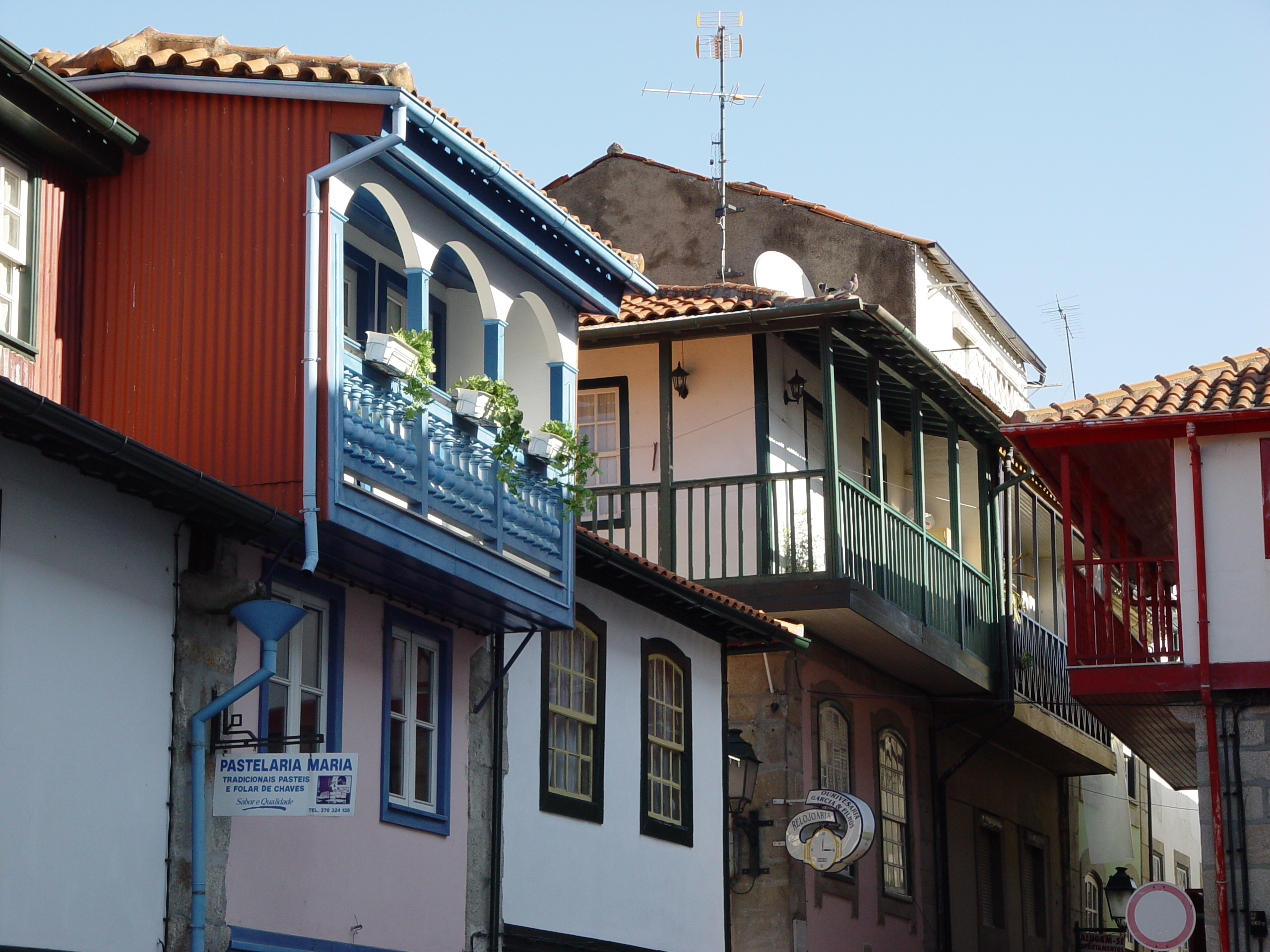 Núcleo urbano da vila de Chaves / Núcleo intramuros da vila e praça de Chaves This file was uploaded for Wiki Loves Monuments in Portugal with the unique identifier 97027252.